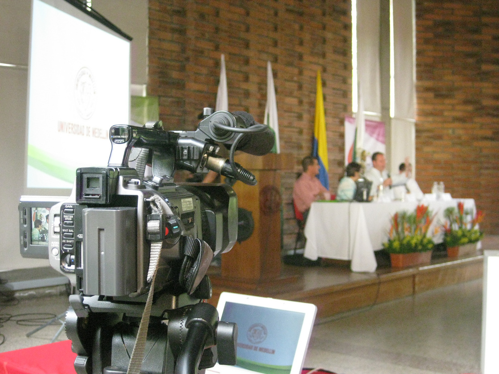 Seminario Internacional de Periodismo Deportivo en el marco de los Juegos Suramericanos Medellin 2010